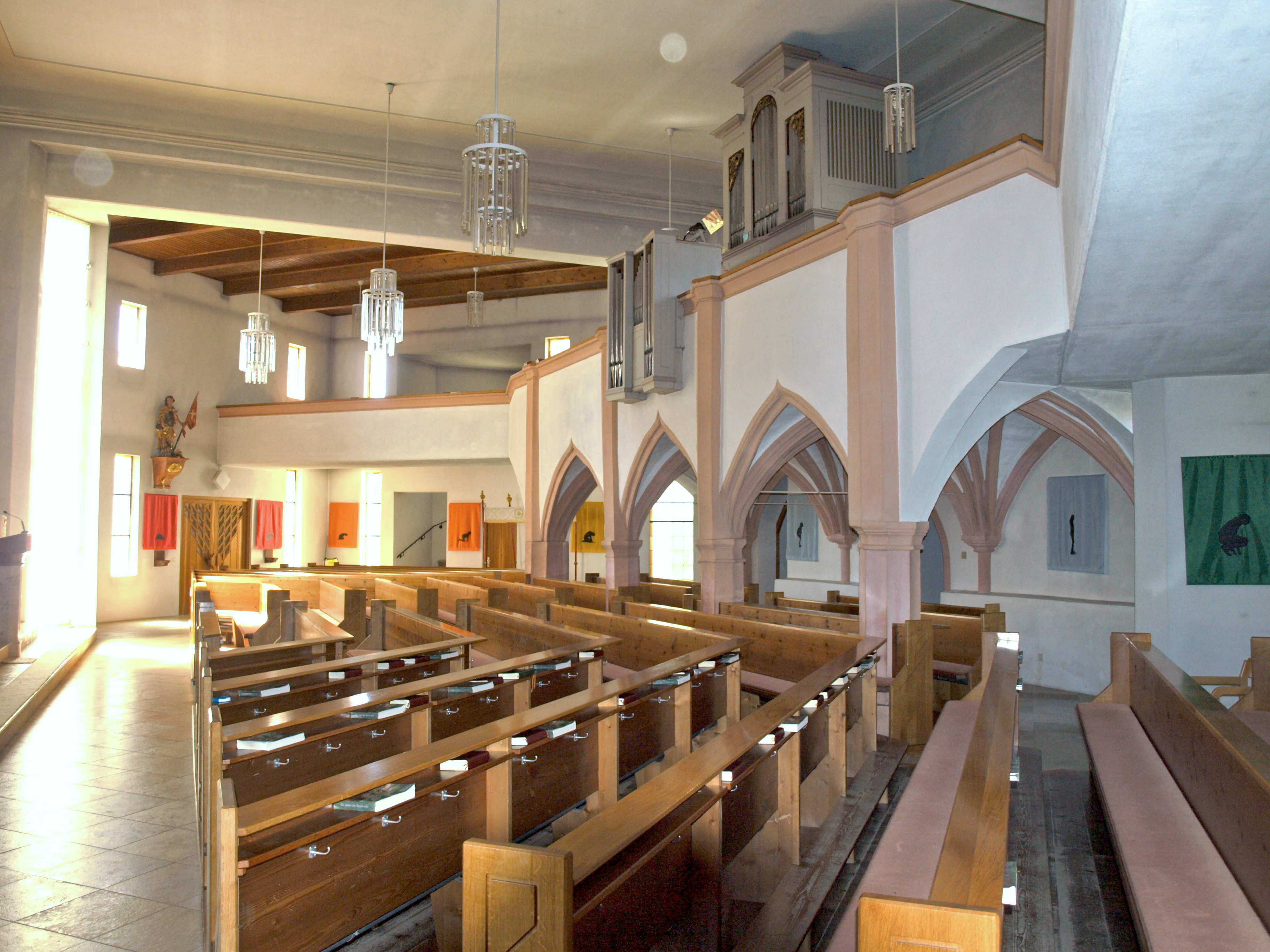 Kath. Pfarrkirche hl. Martin und Glocke